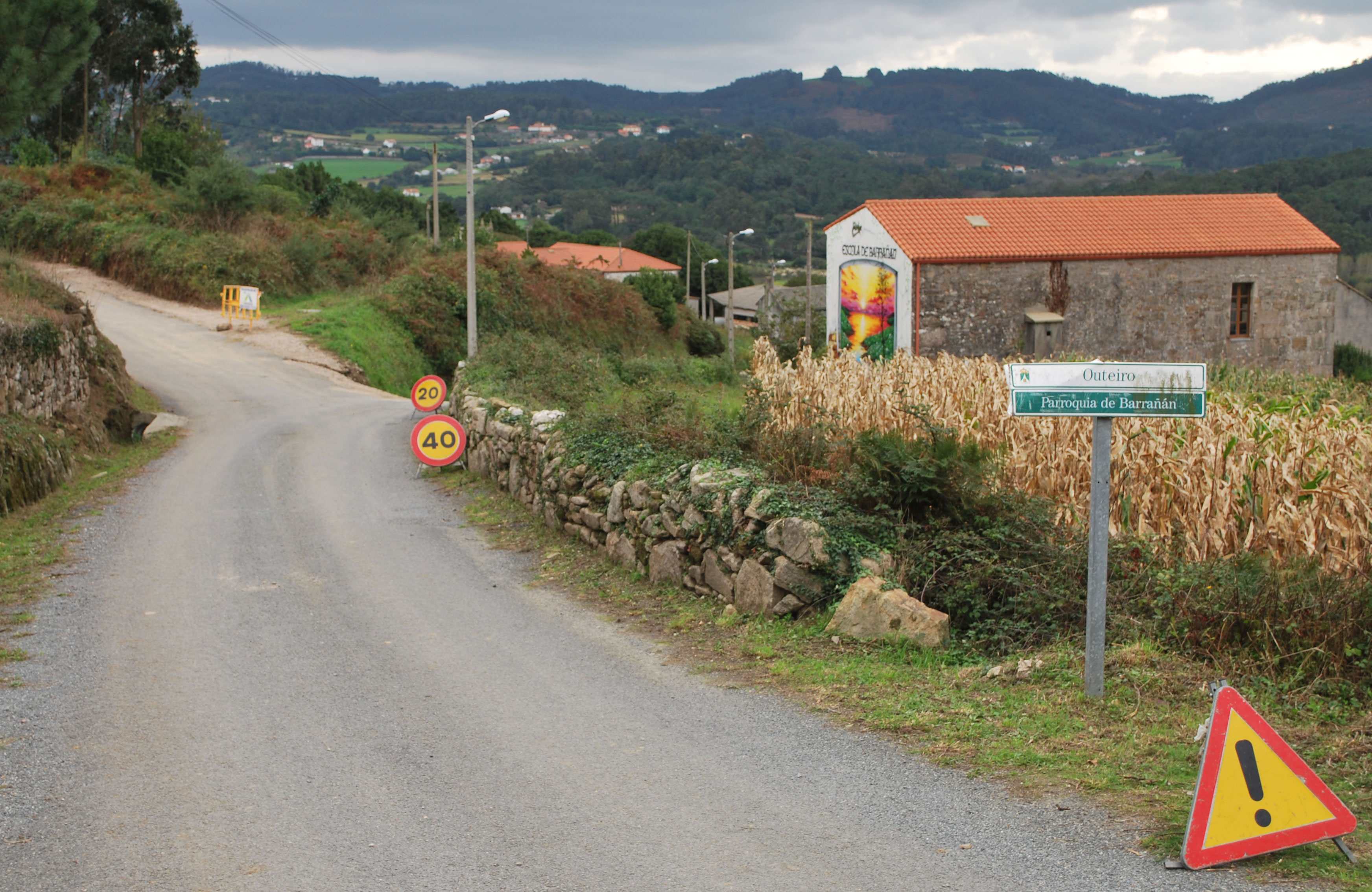 Camiño á escola de Barrañán, Outeiro Arteixo A Coruña Galiza Spain